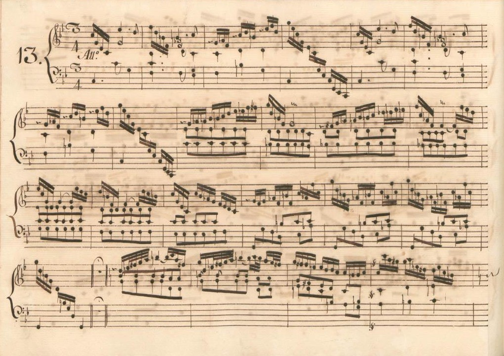 La sonate K. 115, telle qu'elle se présente dans le manuscrit de Parme, volume III no. 13.